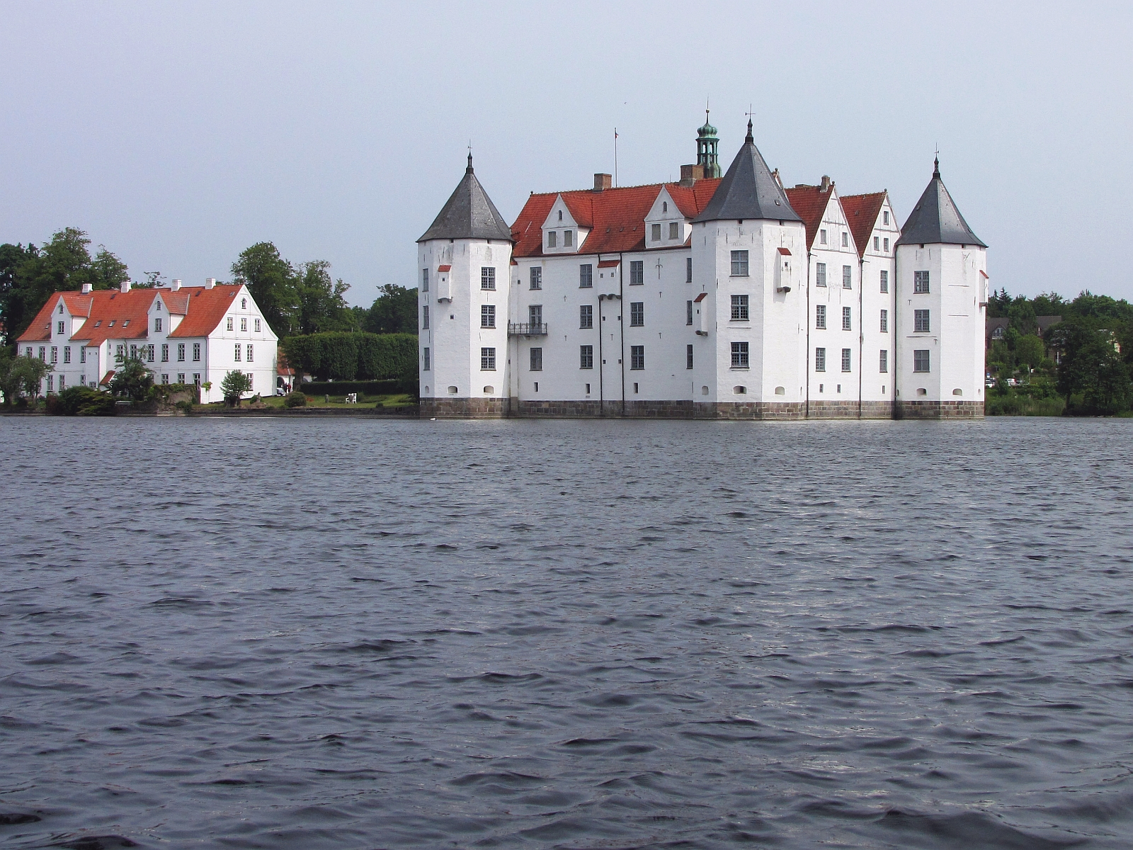 Kulturdenkmal Schloss Glücksburg 4.1c Wasserschloss und Wirtschaftsgebäude Ansicht von Südwest Schleswig-Holstein Foto 2012 Wolfgang Pehlemann Steinberg/Ostsee IMG_8081.jpg